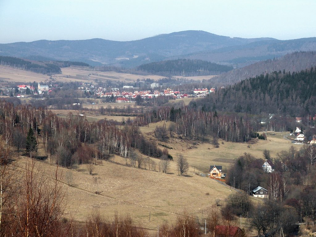 pl.Jawornik Wlk. widoczny nad Stroniem Śląskim (woj. dolnośląskie) jako najwyższy szczyt ponad Obniżeniem Lądka i Stronia. Najdalsze pasmo to Góry Złote, niżej kilka wzniesień pasma Krowiarek. Niżej Stronie Śląskie. Na pierwszym planie zabudowania Starej Morawy i jedno ze wzniesień Gór Bialskich (po prawej) oraz Masywu Śnieżnika (po lewej).